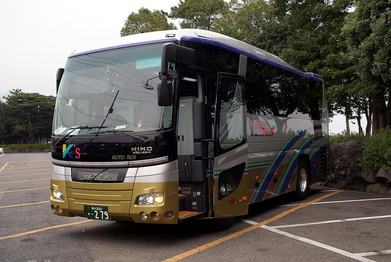 事業者: 琴平バス 陸運登録: 香川200か・279 シャーシ: 日野自動車 ADG-RU8JHAA 車体: ジェイ・バス 年式: 2006年 撮影場所: 別府市的ヶ浜